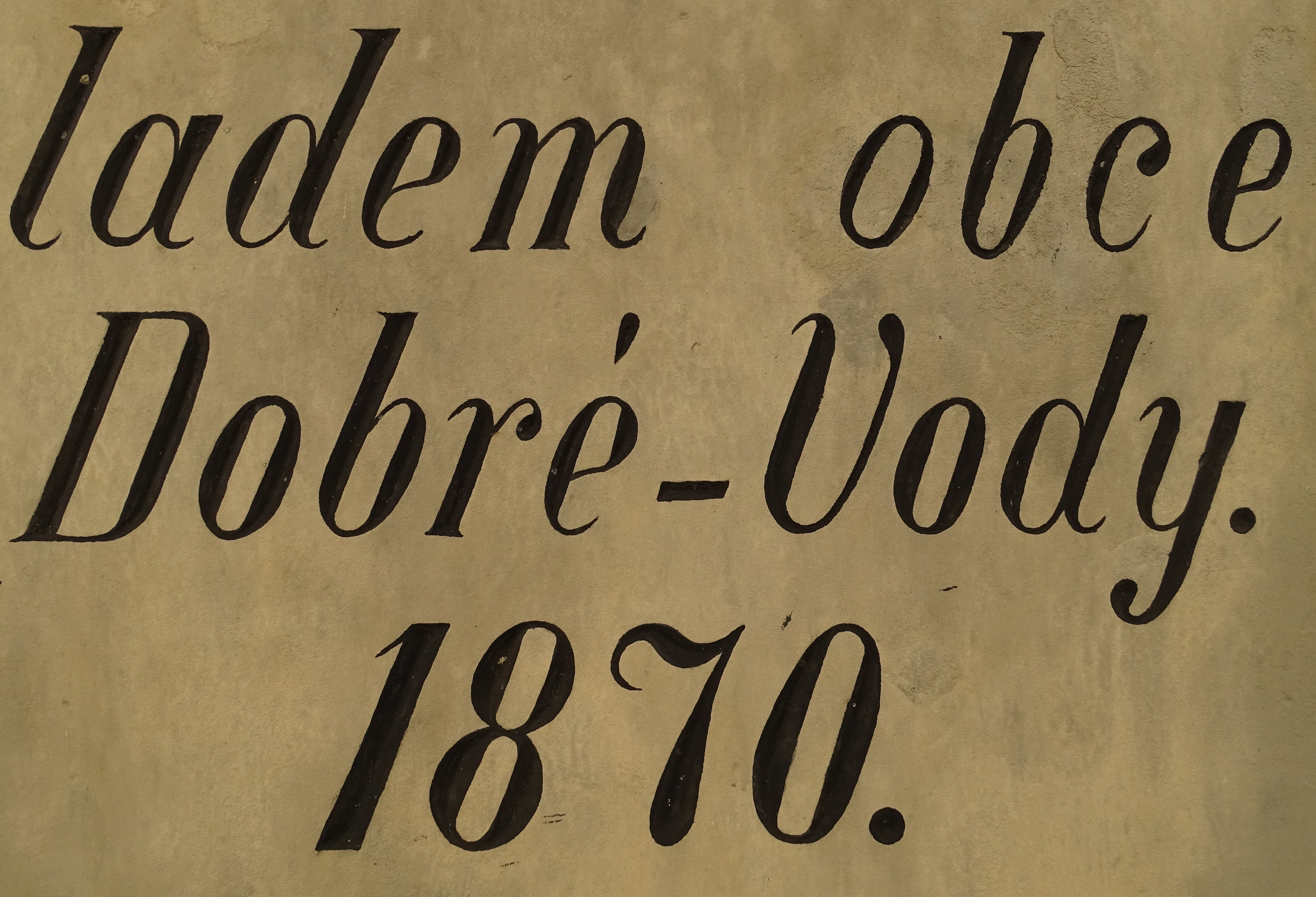 Pojmenování obce v roce 1870